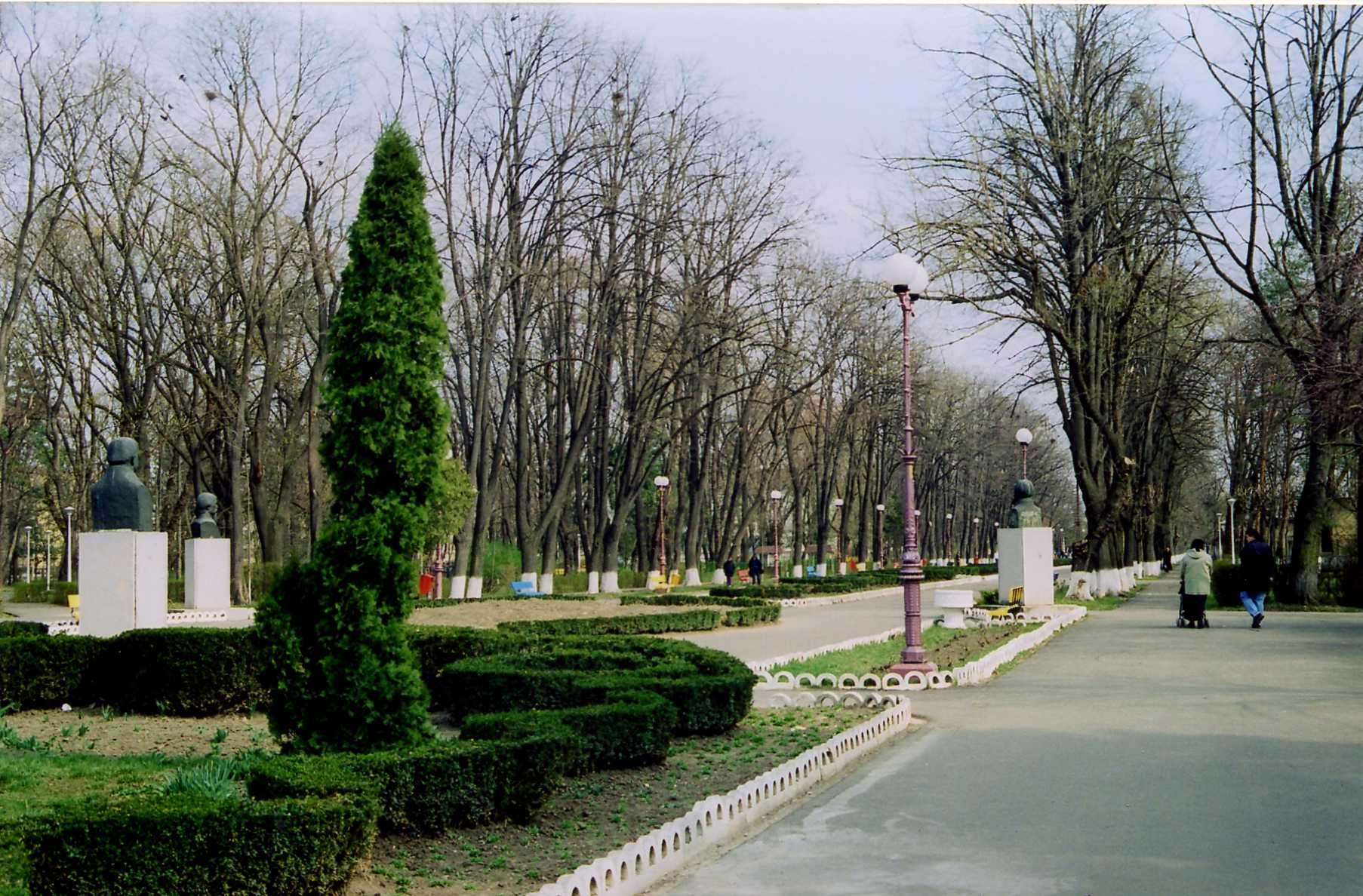 Park v centrální části města Bacǎu, Rumunsko